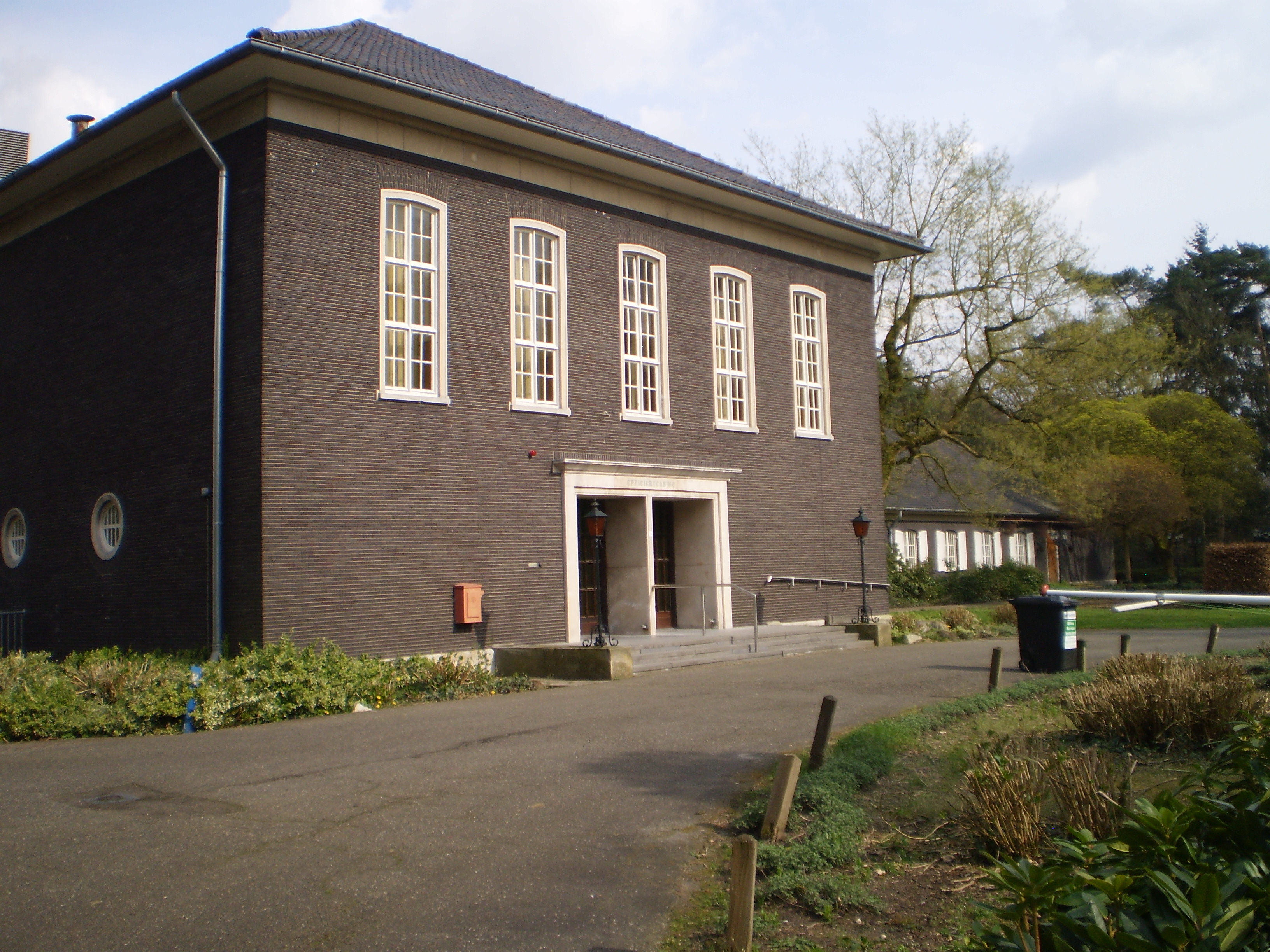 Officierscasino